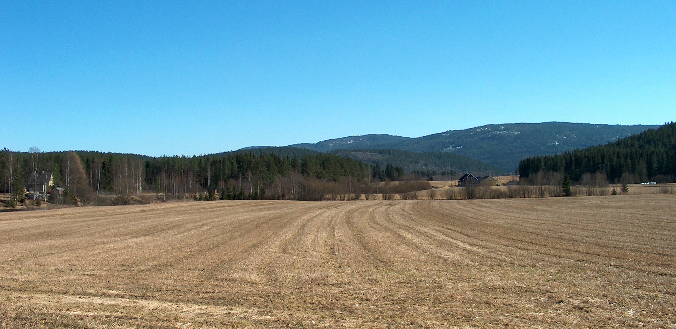 Utsyn sørover Soknedalen fra Sokna